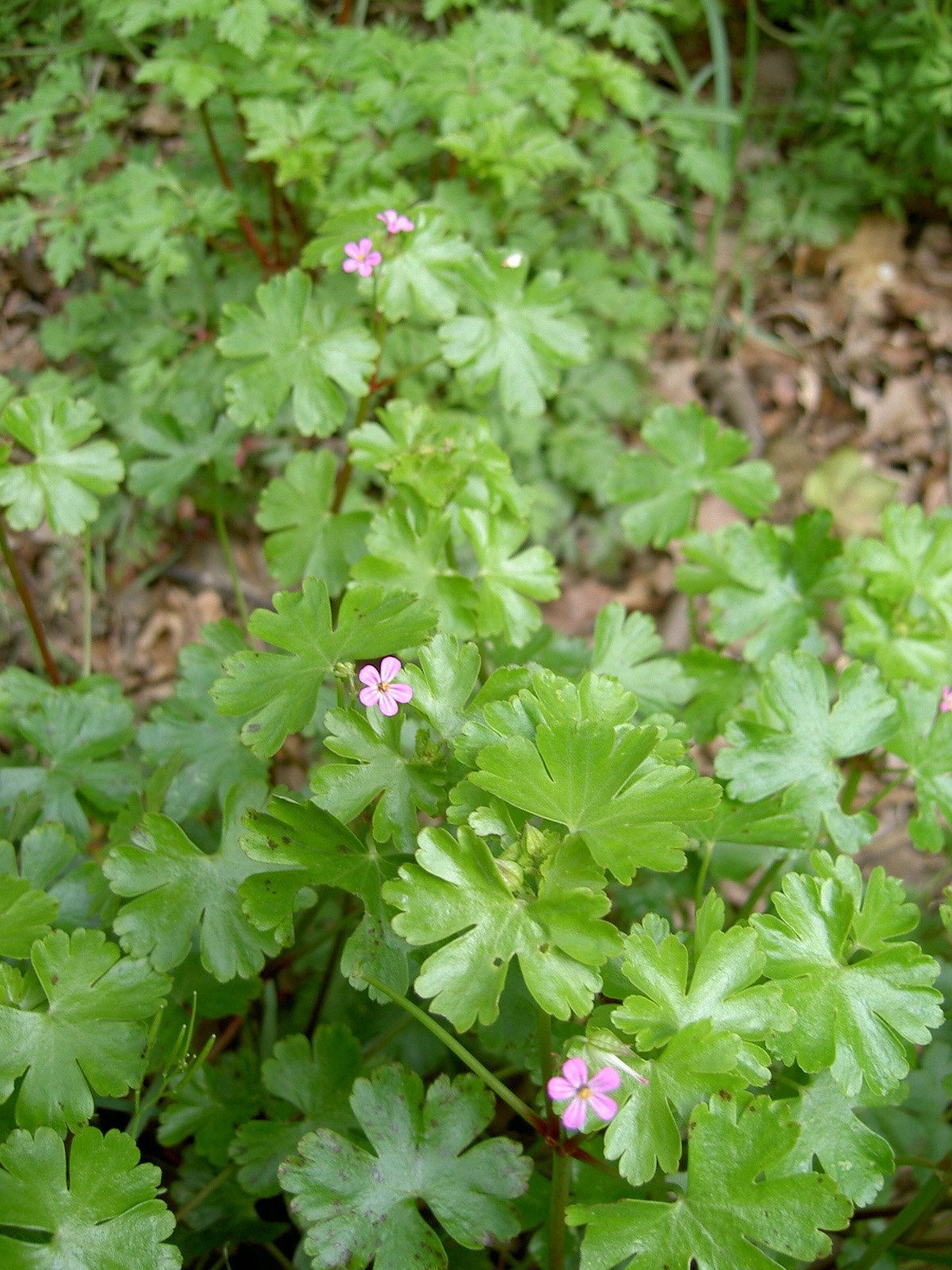 Geranium lucidum, Manche, France